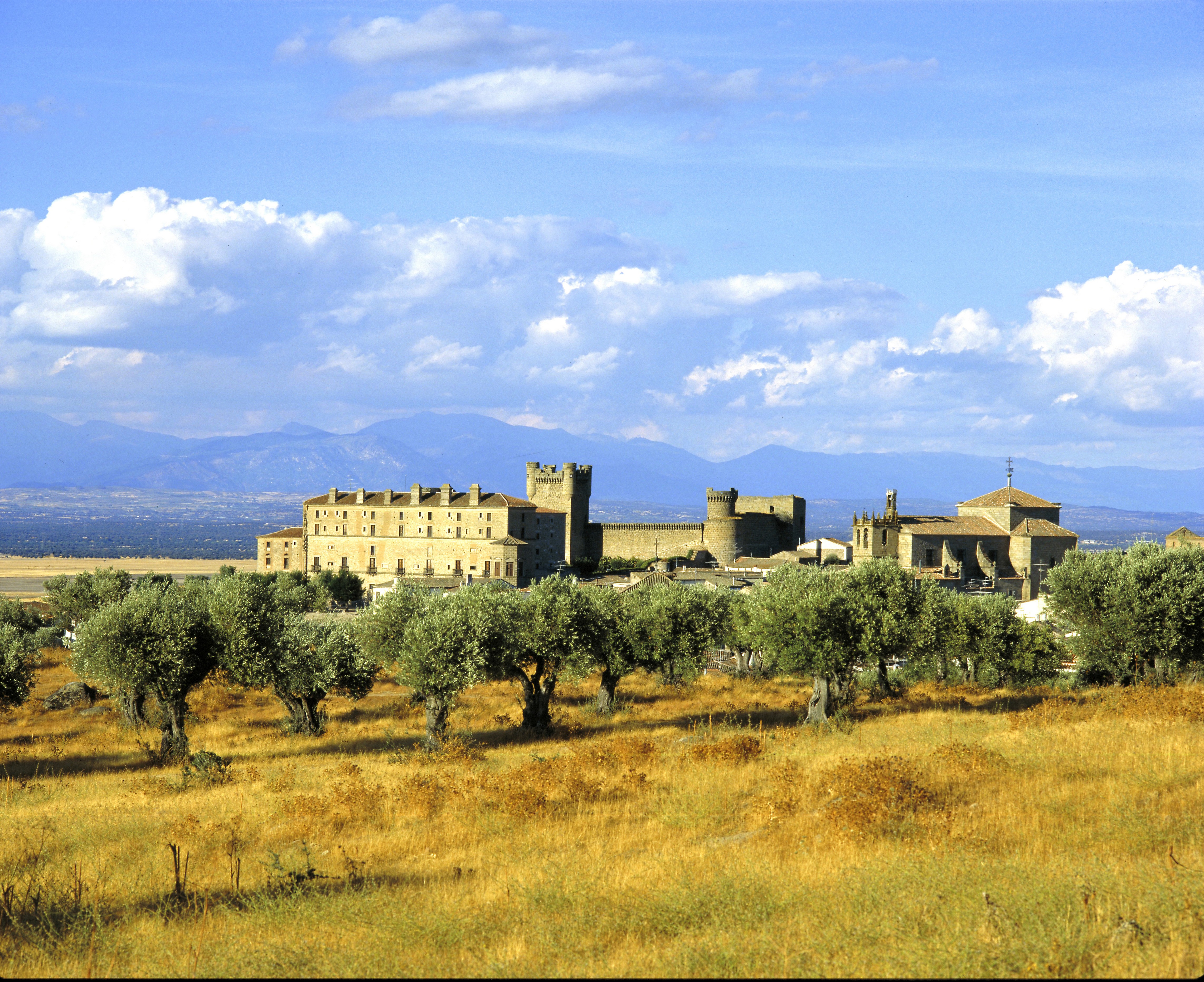 Parador de Oropesa